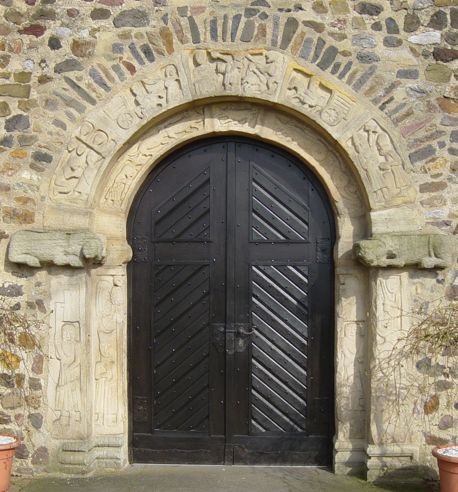 Ev. St.-Peters-Kirche in Großen-Linden, Ortsteil von Linden (Hessen), Westportal